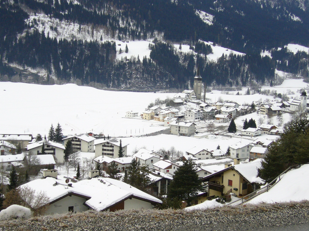 Sagogn, Kanton Graubünden, Schweiz